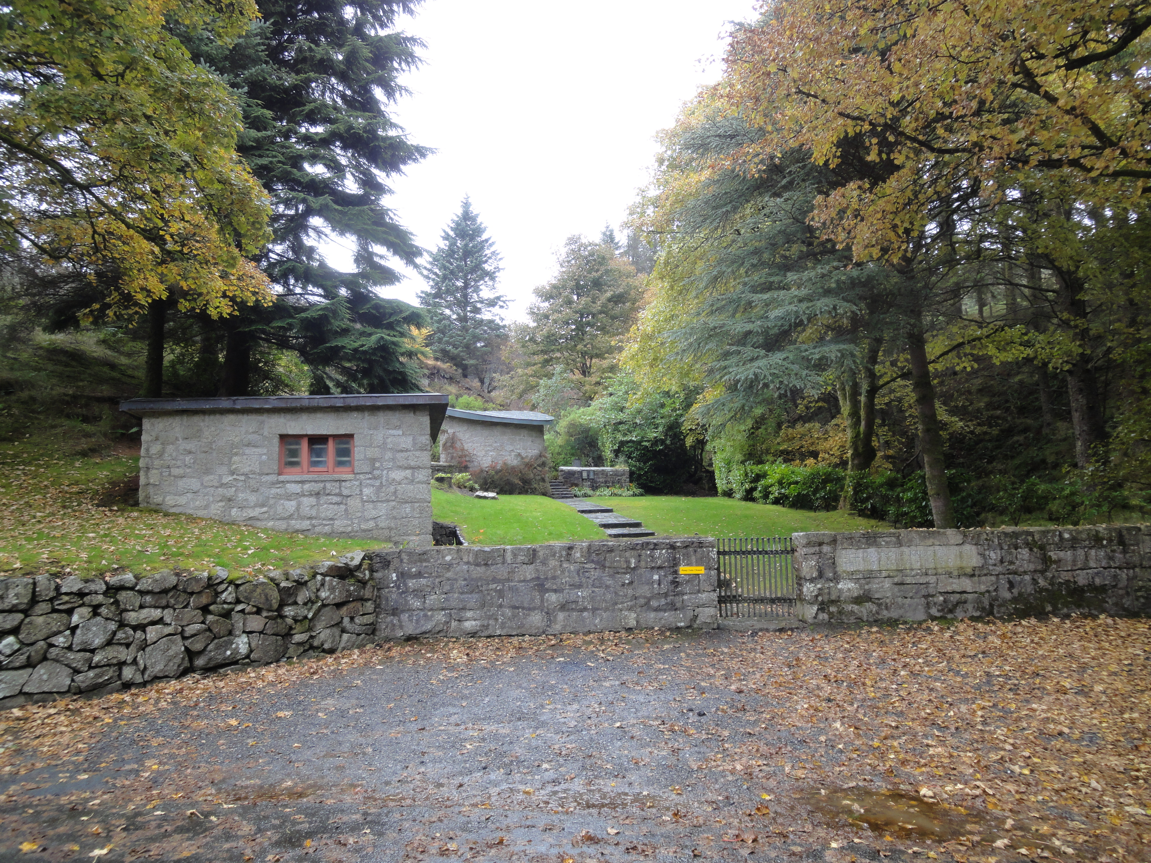 Soldatenfriedhof Glencree - Straßenseite